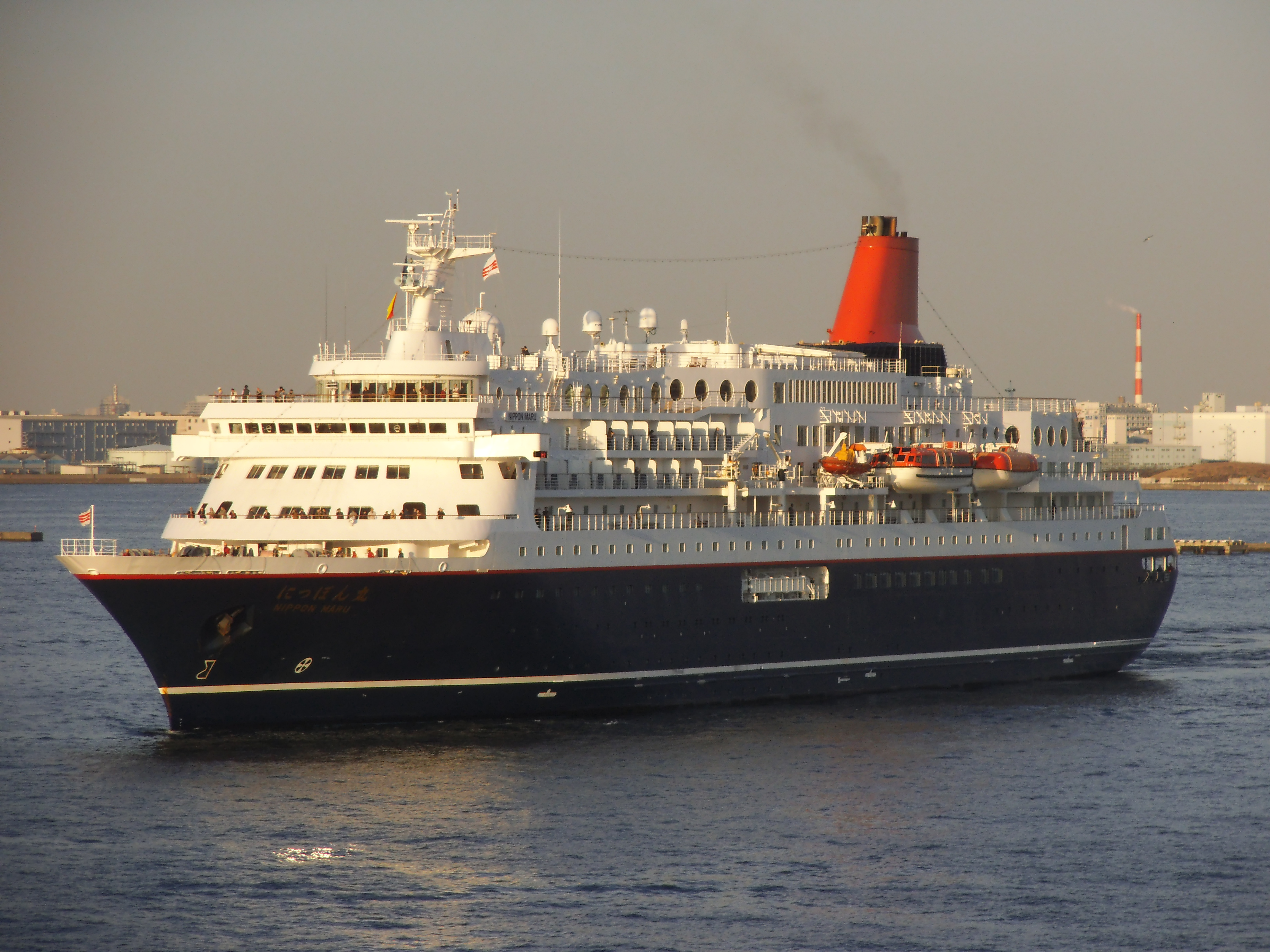 大改装の後の豪華客船にっぽん丸